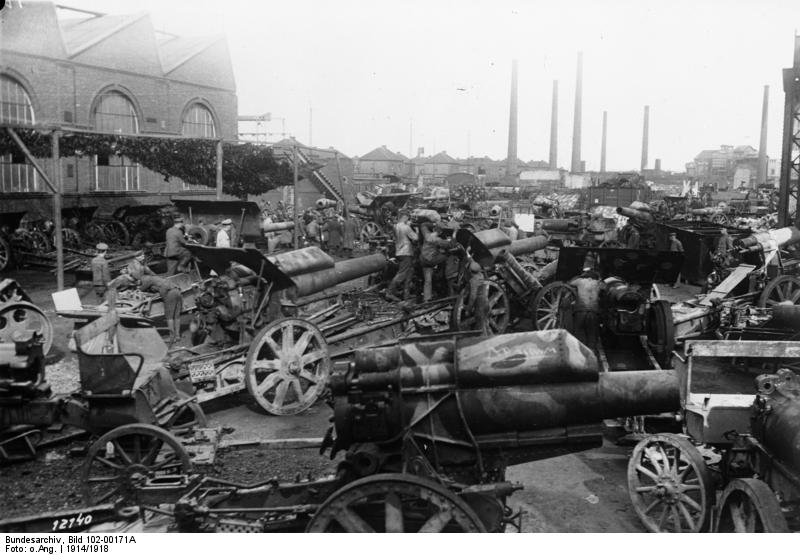 Beutegeschütze